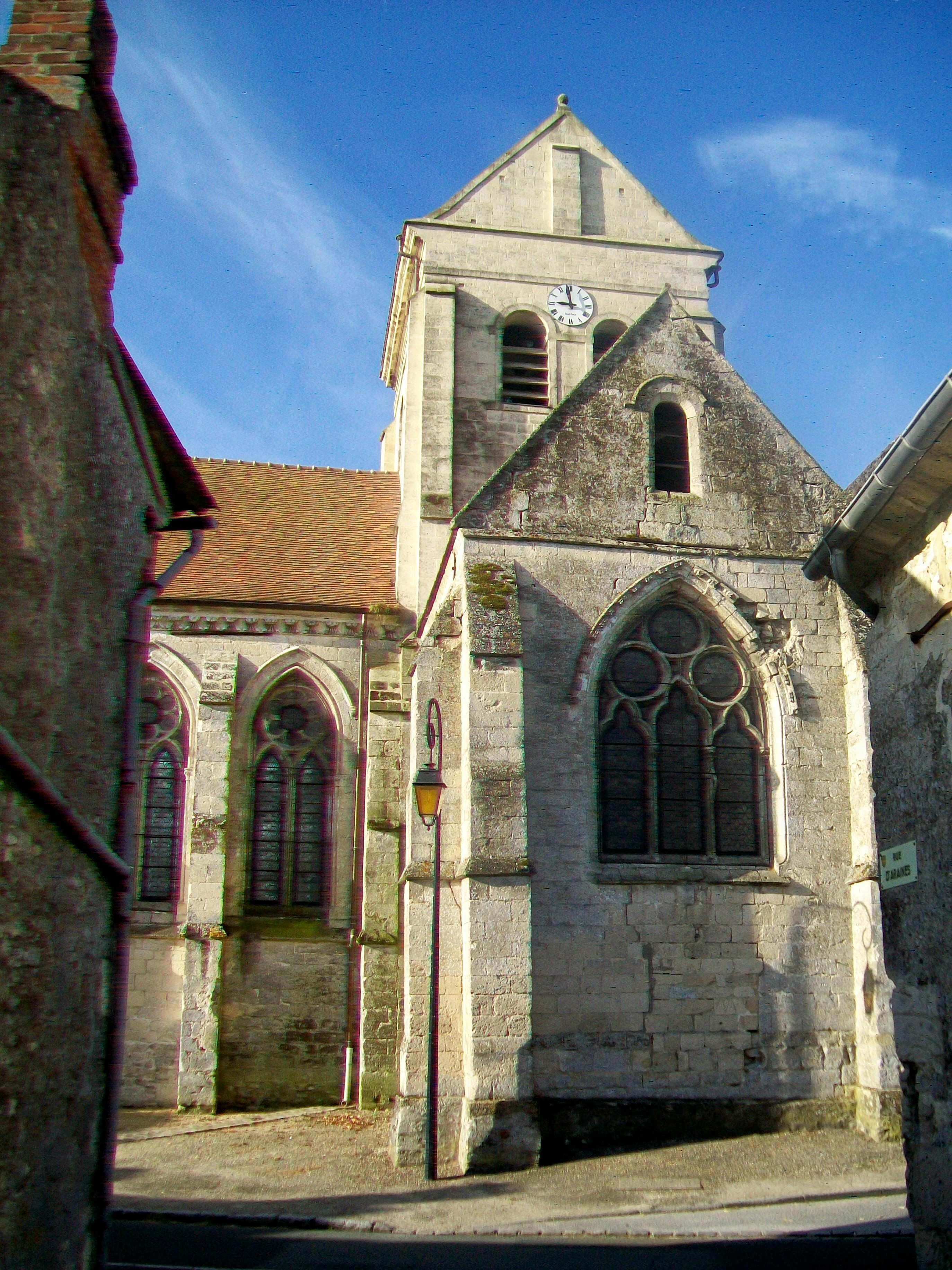 Vue depuis le nord - transept nord et clocher.